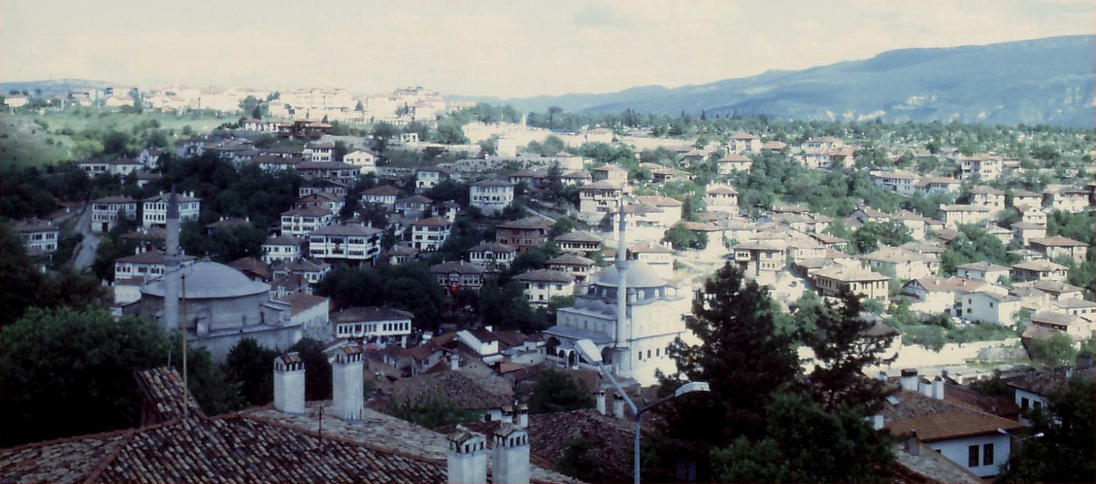 Panorama der Unterstadt von Safranbolou